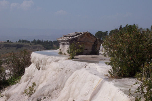 eigen foto